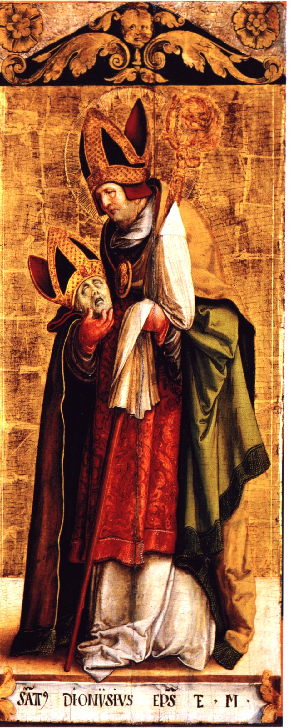 Ausstattung der ehemaligen Seitenaltäre der Meßkircher St. Martinskirche, Standflügel: Heiliger Dionysius von Paris als Bischof und Märtyrer